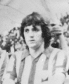 Collectie / Archief : Fotocollectie Anefo Reportage / Serie : Halve finale UEFA Cup RWD Molenbeek - Athletic de Bilbao (1977) Beschrijving : Elftalfoto Athletic de Bilbao (archief) Datum : 4 april 1977 Locatie : Bilbao, Spanje Trefwoorden : Europacup, UEFA Cup, voetbal Fotograaf : [onbekend] Auteursrechthebbende : Nationaal Archief Materiaalsoort : Negatief (zwart/wit) Nummer archiefinventaris : bekijk toegang 2.24.01.04 Bestanddeelnummer : 929-1073